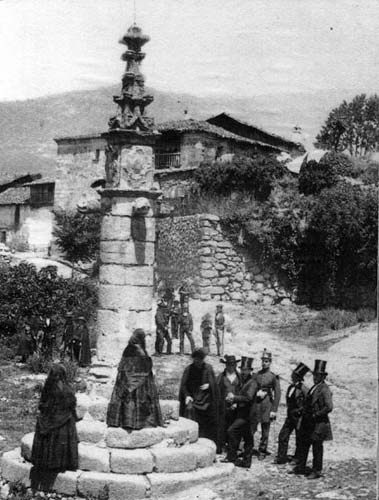 Jarandilla de la Vera (Extremadura, Spain) Picota